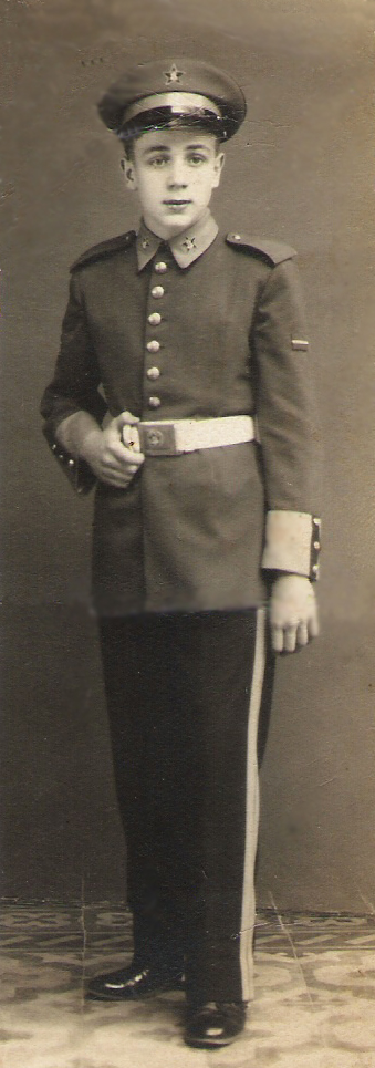 Aluno da primeira companhia usando antigo uniforme de gala.